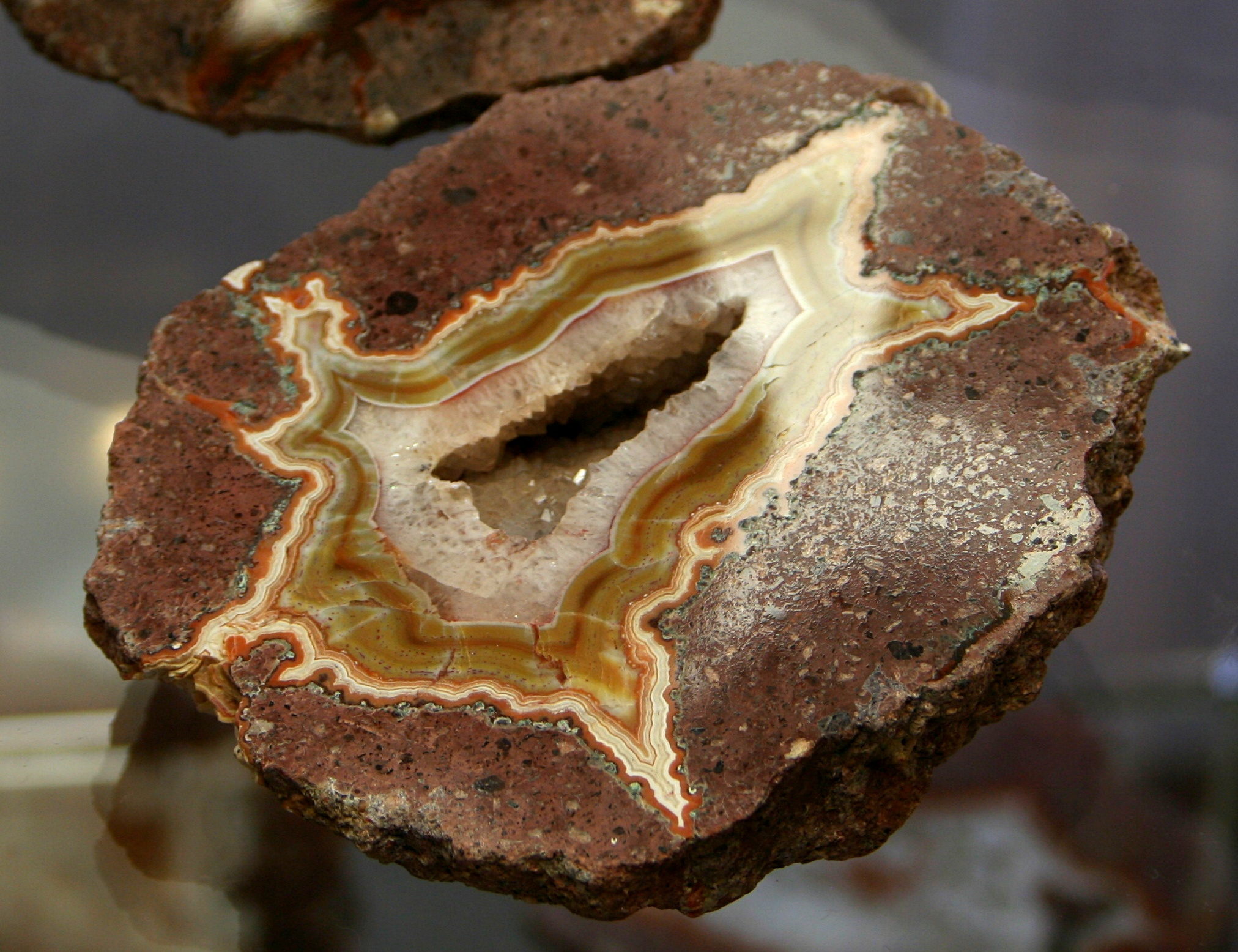 Agat z Nowego Kościoła w Muzeum Złota w Złotoryi